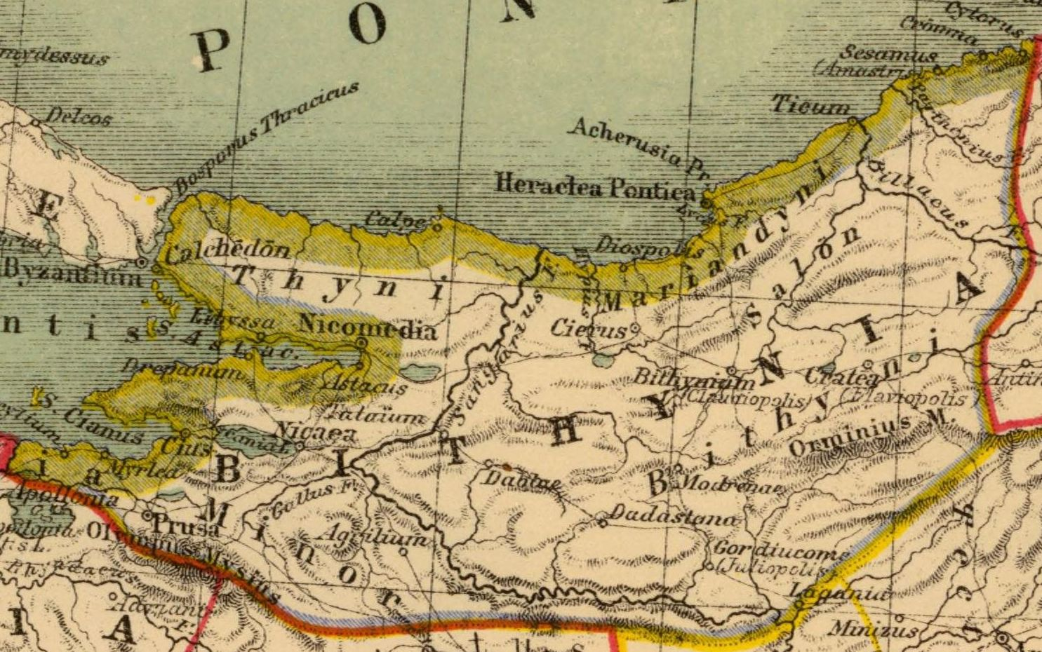 Bithynia. Asia citerior. Auctore Henrico Kiepert Berolinensi. Geographische Verlagshandlung Dietrich Reimer (Ernst Vohsen) Berlin, Wilhemlstr. 29. (1903)